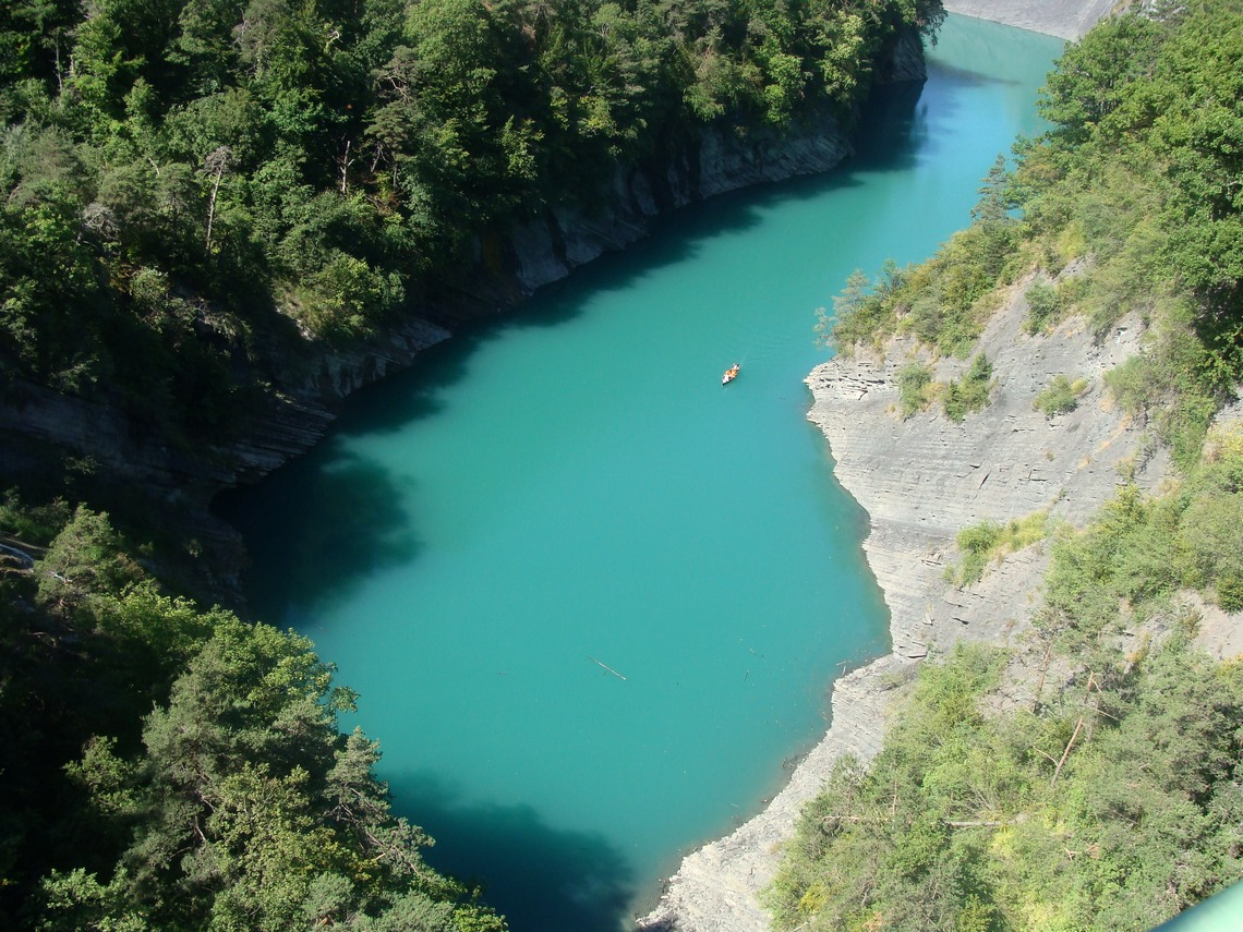 L'Ebron, affluent du Drac, se jette dans le lac de Monteynard-Avignonet. La barque de promenade sur le plan d'eau donne une idée de l'échelle (vue prise depuis le pont de Brion).